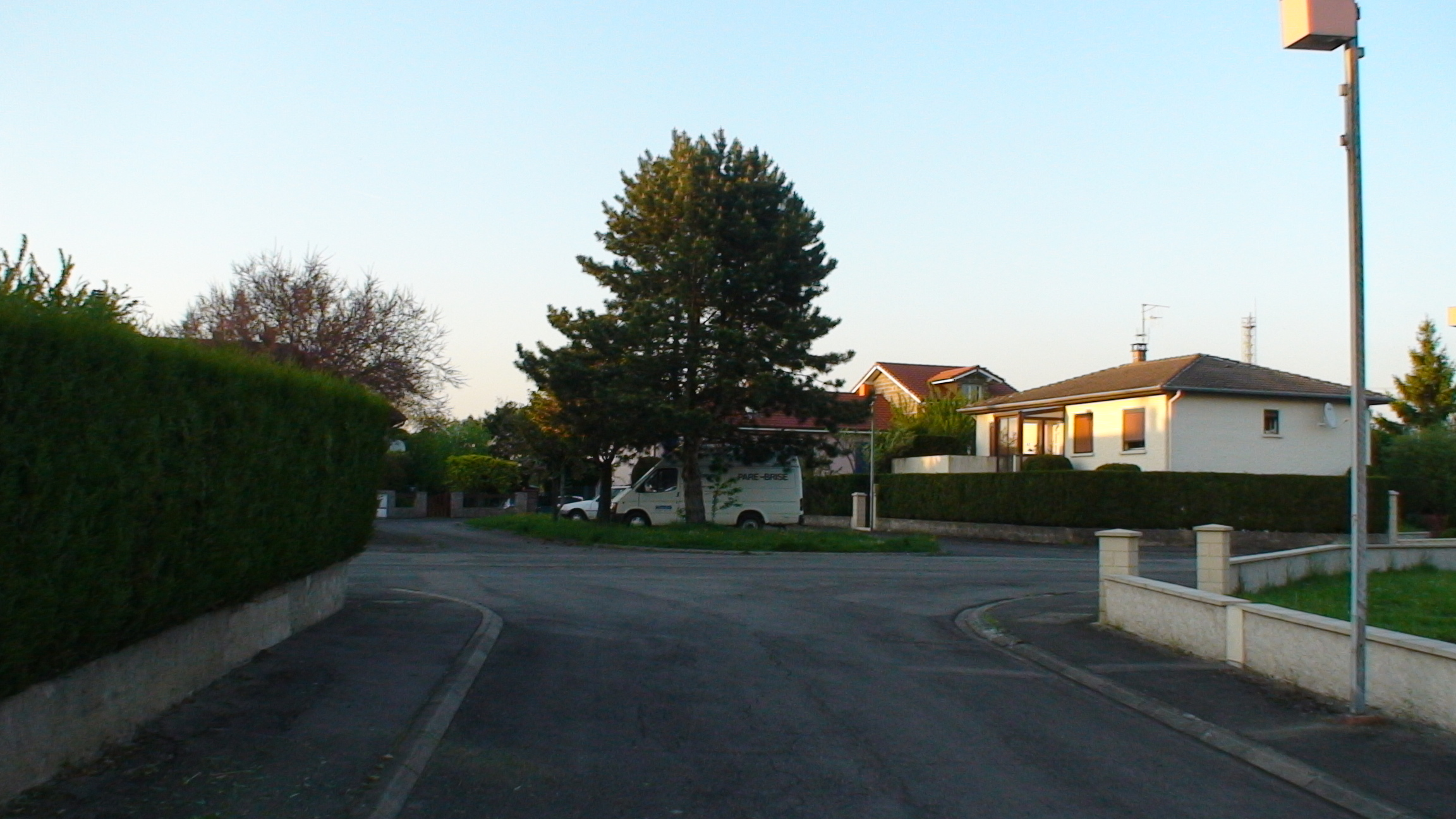 Photo d'une partie du Lotissement Clair Matin prise depuis le n°24.